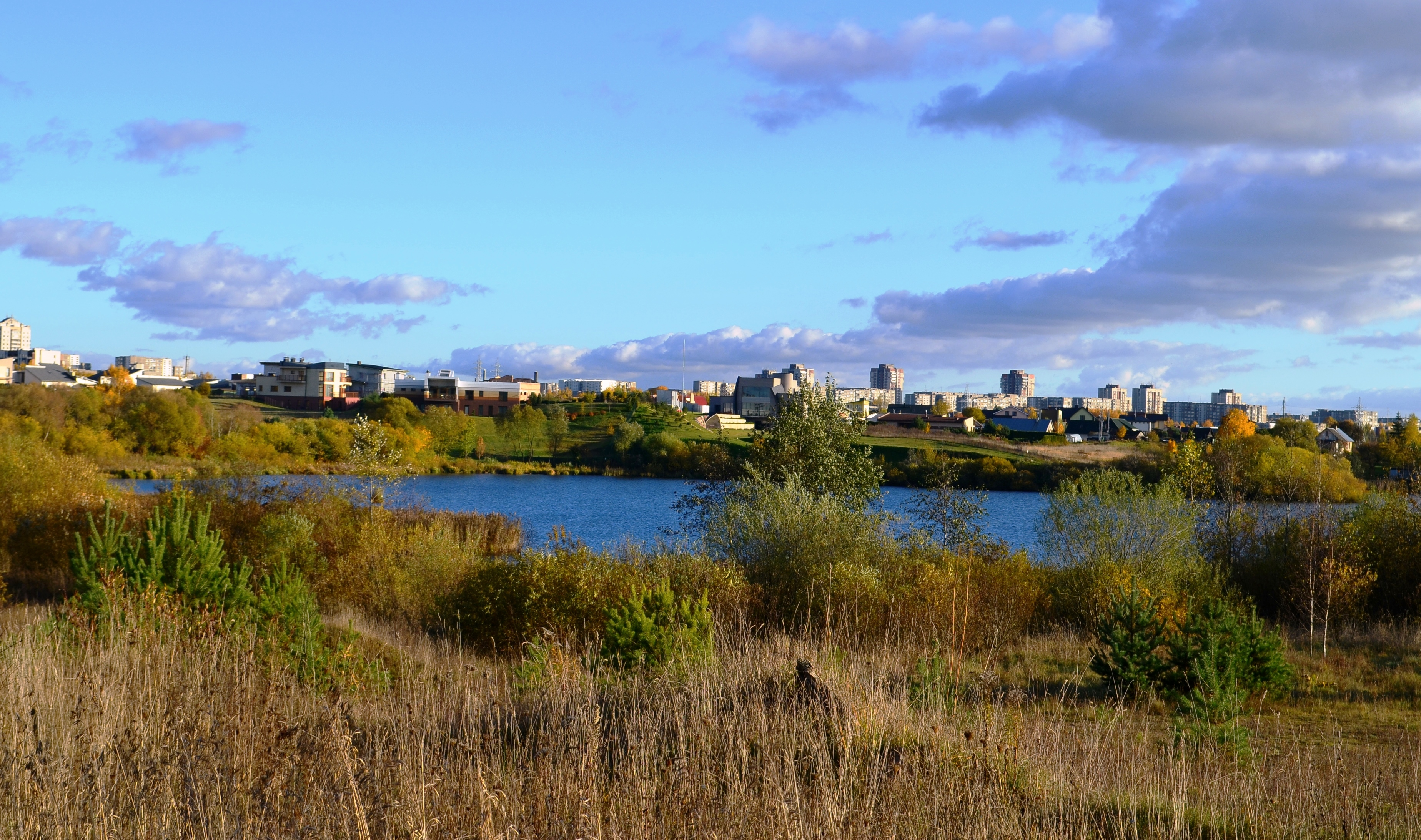 Bevardis ežerėlis (tvenkinys), Naujosios Gineitiškės, Vilnius